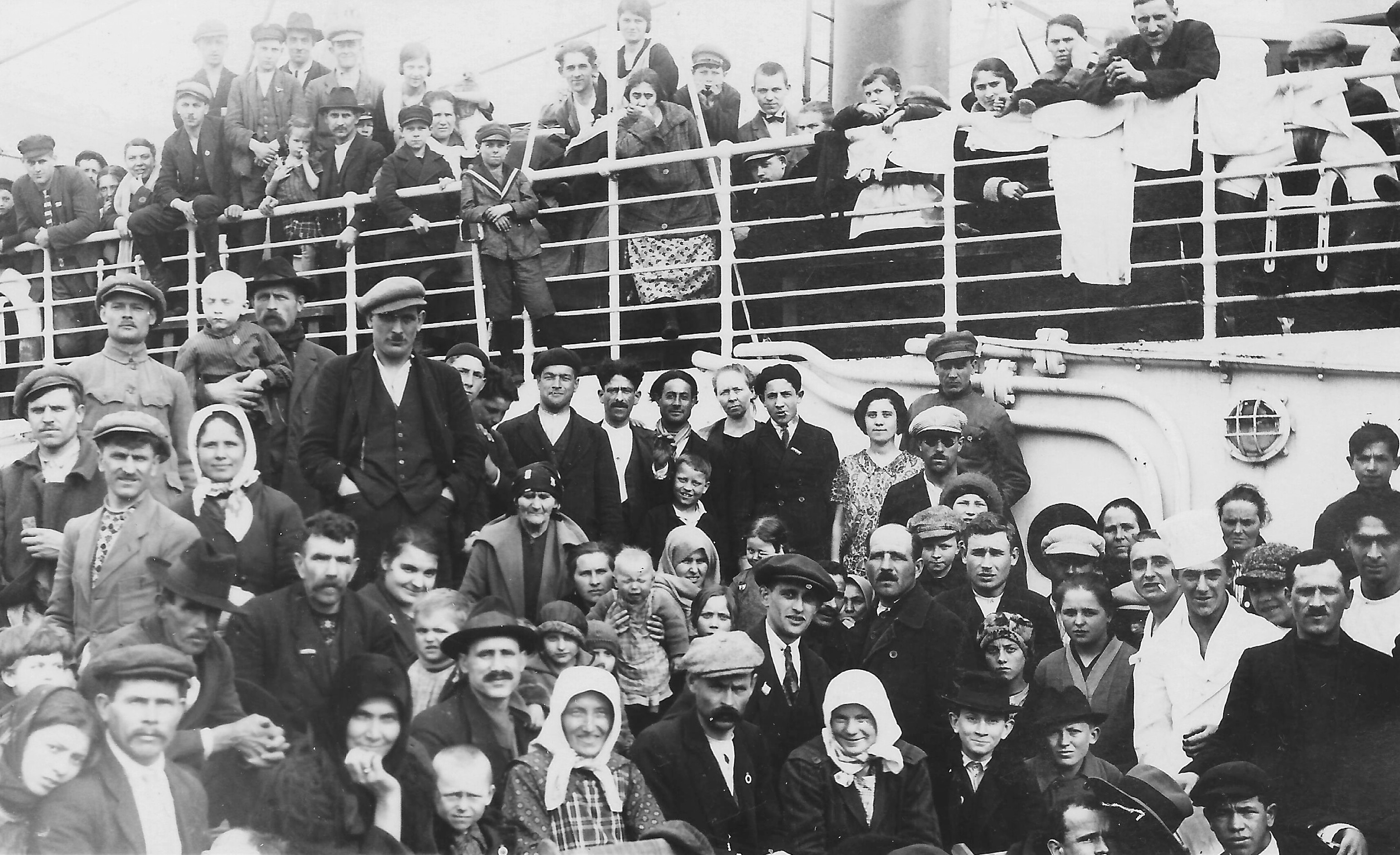 Landverhuizers aan boord van het stoomschip Orania